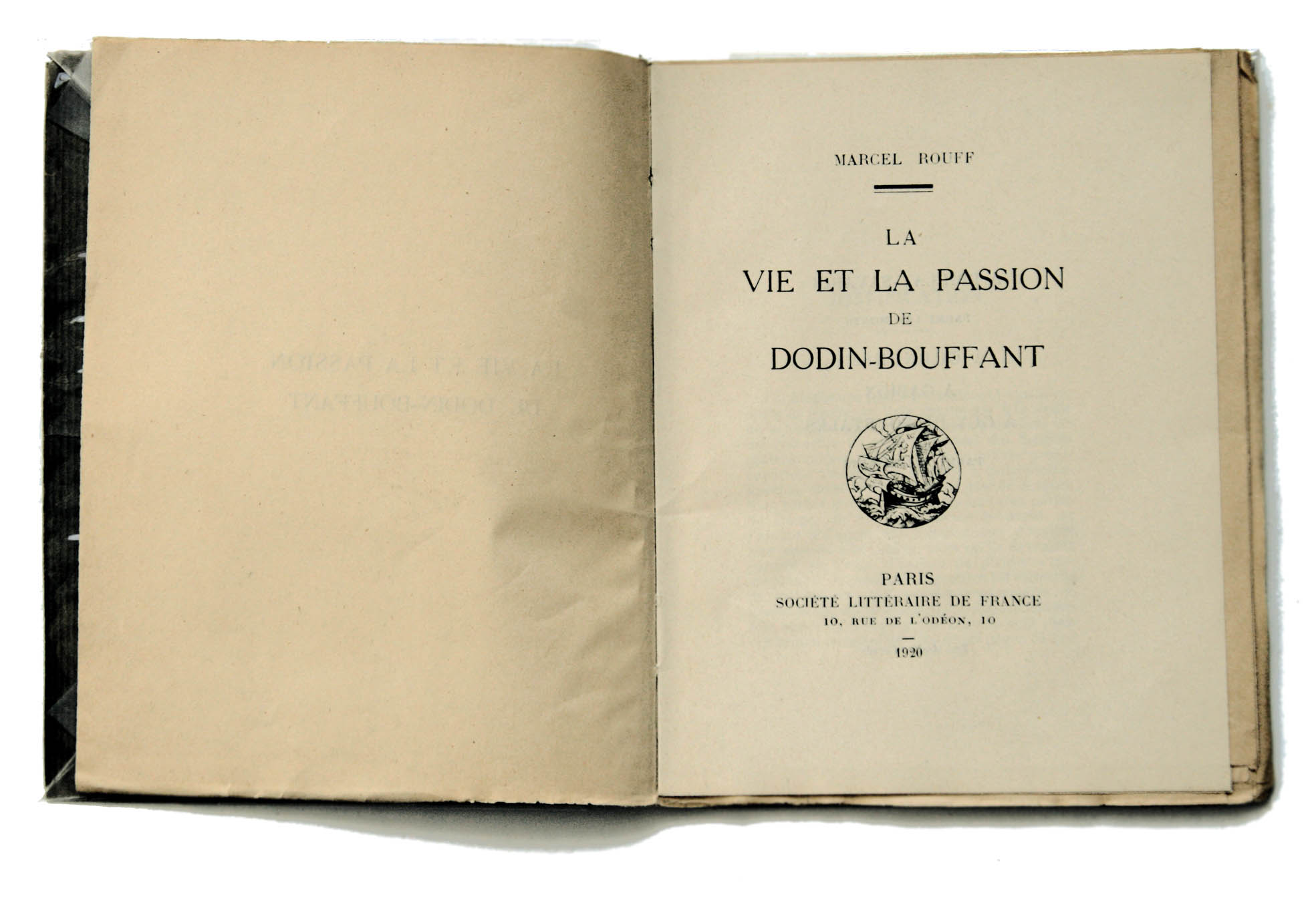 première édition non illustré de Dodin Bouffant avec 4 chapitres